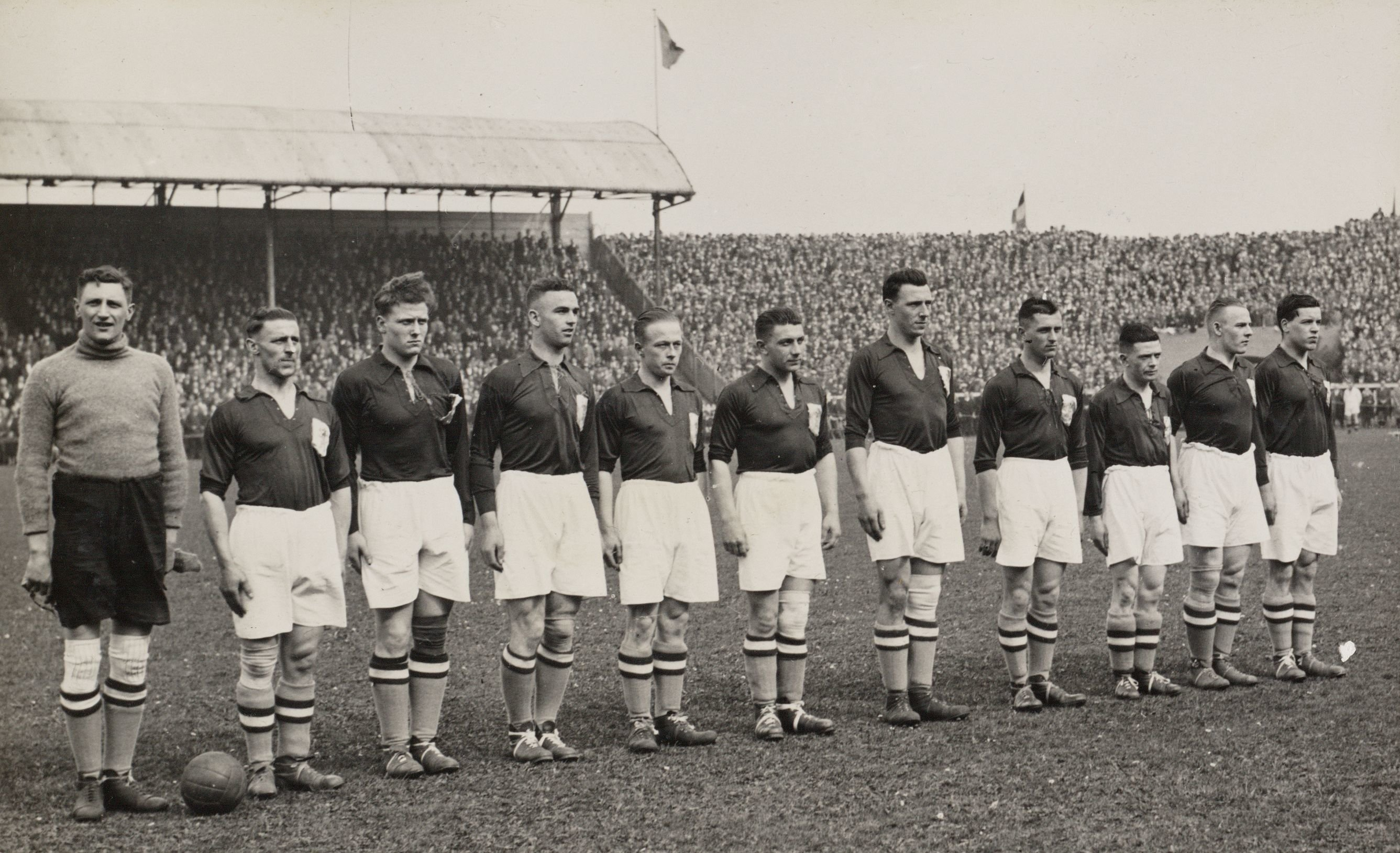 Het Nederlands elftal voor de interland tegen België. Van links naar rechts: Gejus van der Meulen, Sjef van Run, Mauk Weber, Henk Pellikaan, Piet van Reenen, Puck van Heel, Wim Anderiesen, Otto Bonsema, Frank Wels, Jan van den Broek en Joop van Nellen. België - Nederland (1-3), gespeeld op 9 april 1933 in het stadion van de Royal Antwerp FC (De Bosuil) te Antwerpen. Opstelling: Gejus van der Meulen (HFC, aanvoerder), Mauk Weber (ADO), Sjef van Run (PSV), Henk Pellikaan (LONGA), Wim Anderiesen (Ajax), Puck van Heel (Feyenoord), Frank Wels (Unitas), Otto Bonsema (Velocitas Groningen), Piet van Reenen (Ajax), Jan van den Broek (PSV) en Joop van Nellen (DHC).